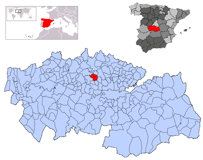 Noés en la provincia de Toledo